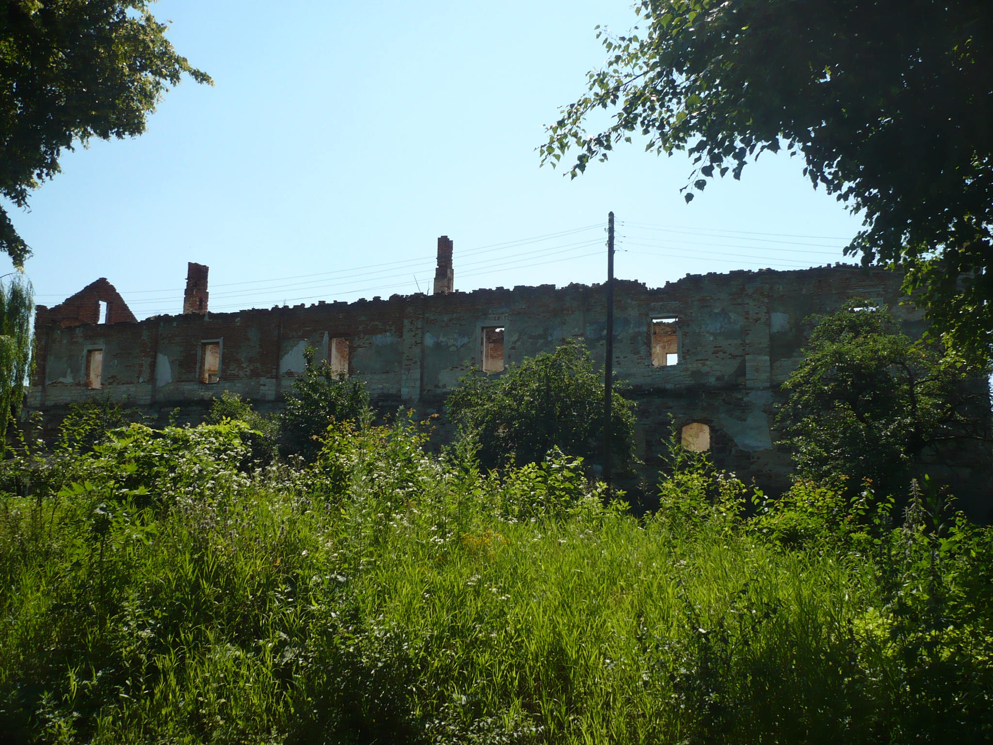 Potok Złoty. Zamek